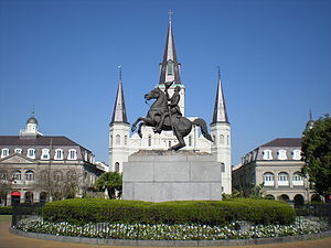 Новий Орлеан